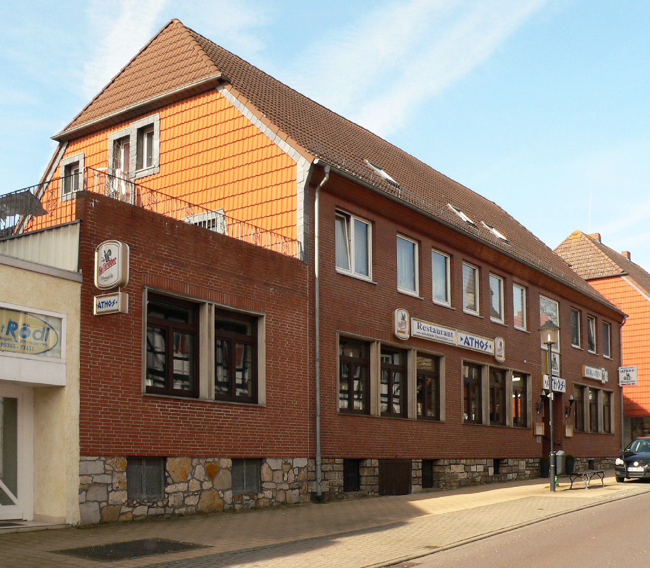 Vorsfelde, Amtsstrasse 19, ehemaliges Vorwerk